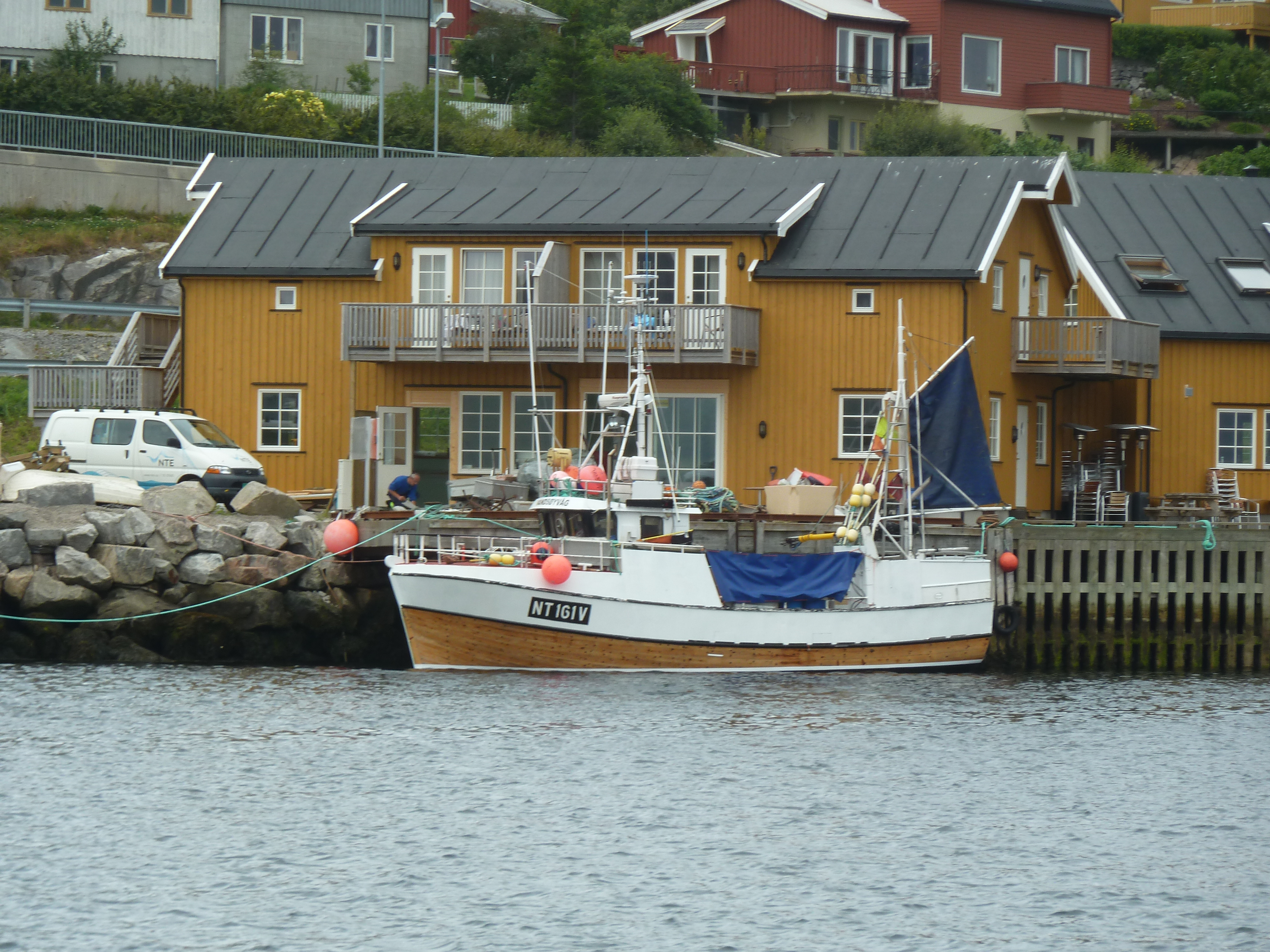 Rørvik harbour, Norway